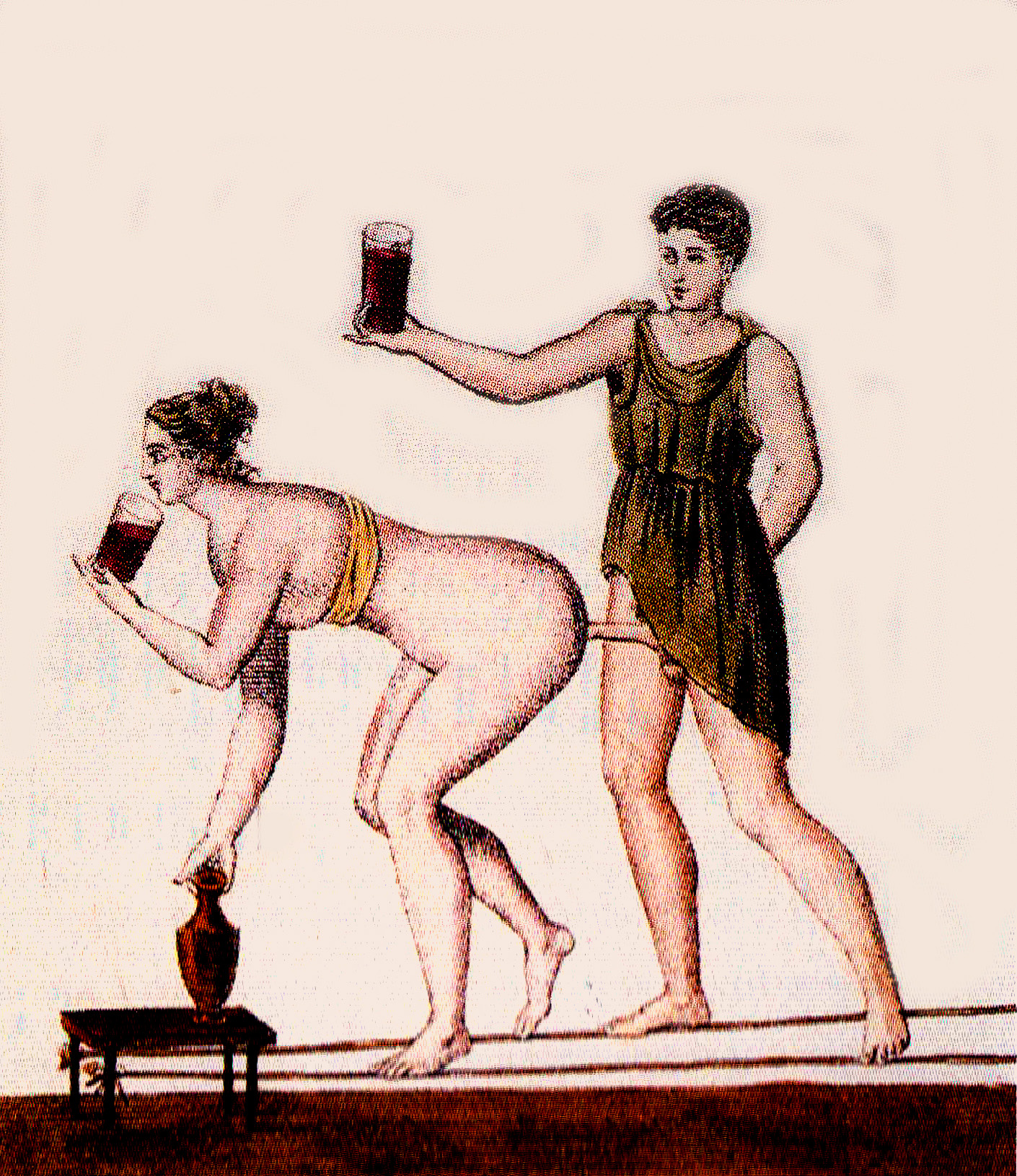 Cabinet secret du musée de Naples, fresque de la taverne de Mercure disparue copiée en 1876.